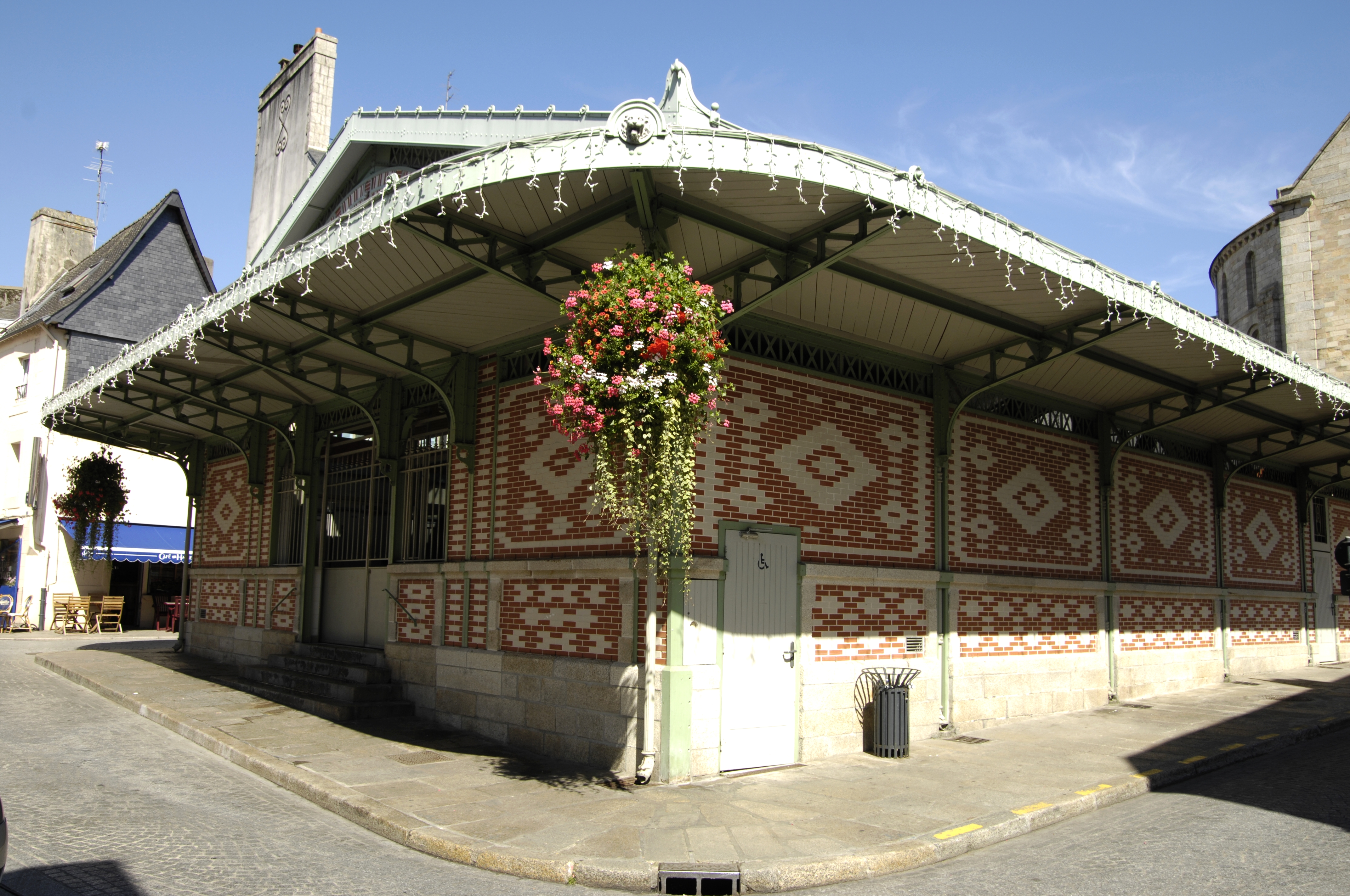 Quimperle, Bretagne, Markthalle